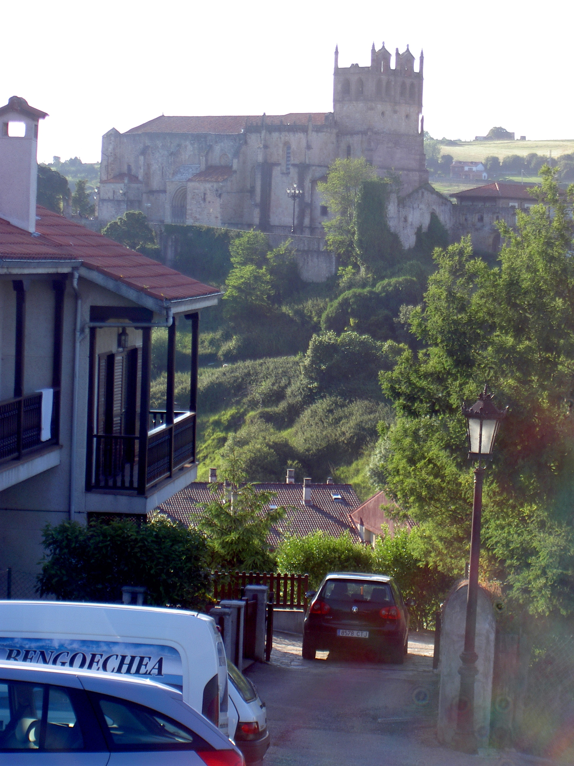 Die Kirche Iglesia de Santa María de los Ángeles in San Vicente dela Barquera